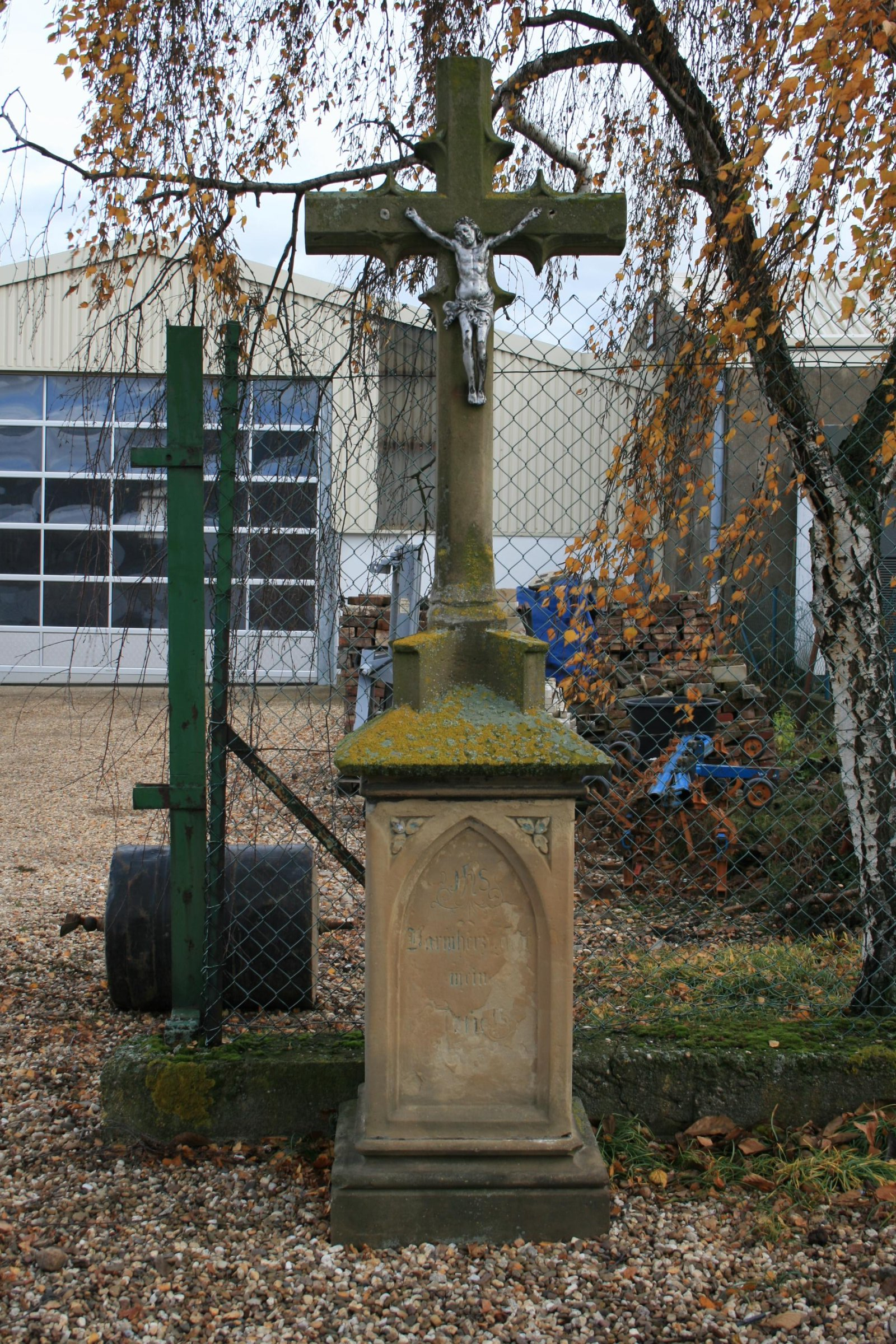 Das Kreuz vor dem Haus Heinrich-Veith-Str. 4 in Nörvenich-Eschweiler ü.F.